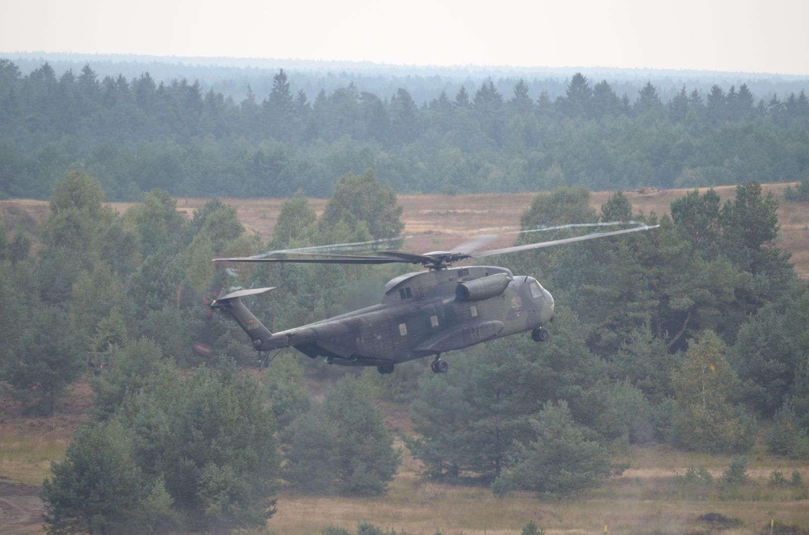 Eindrücke von der ILÜ 2012 der BW 24.09.2012)